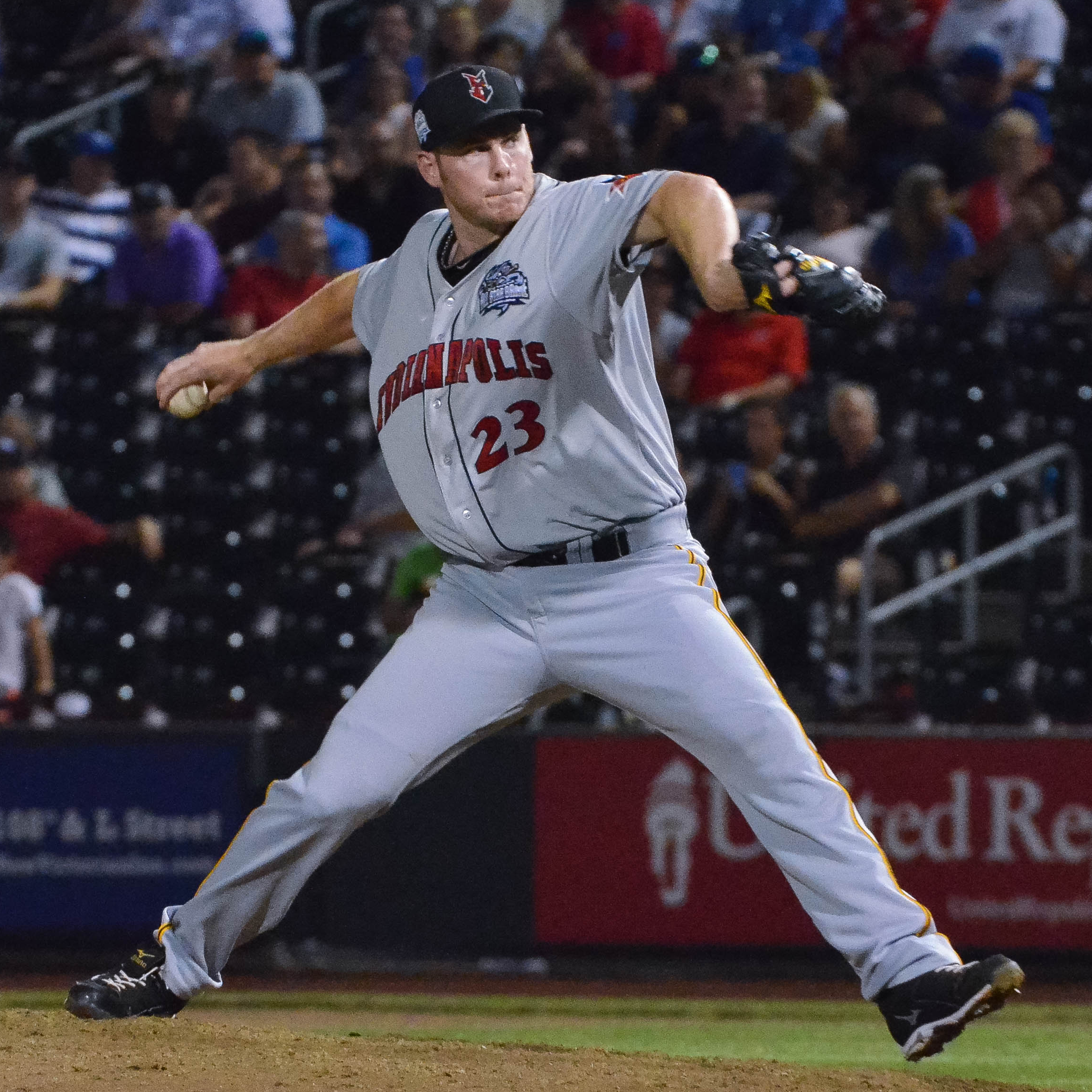 Blake Wood